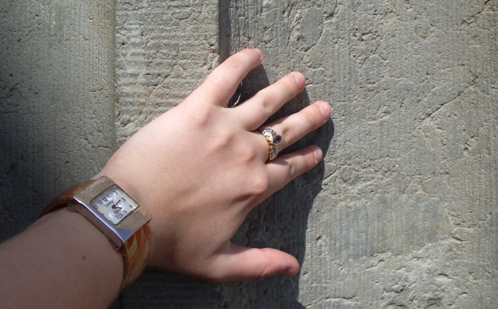 Nur eine tastende Hand am grauen Beton des Denkmals für die ermordeten Juden Europas